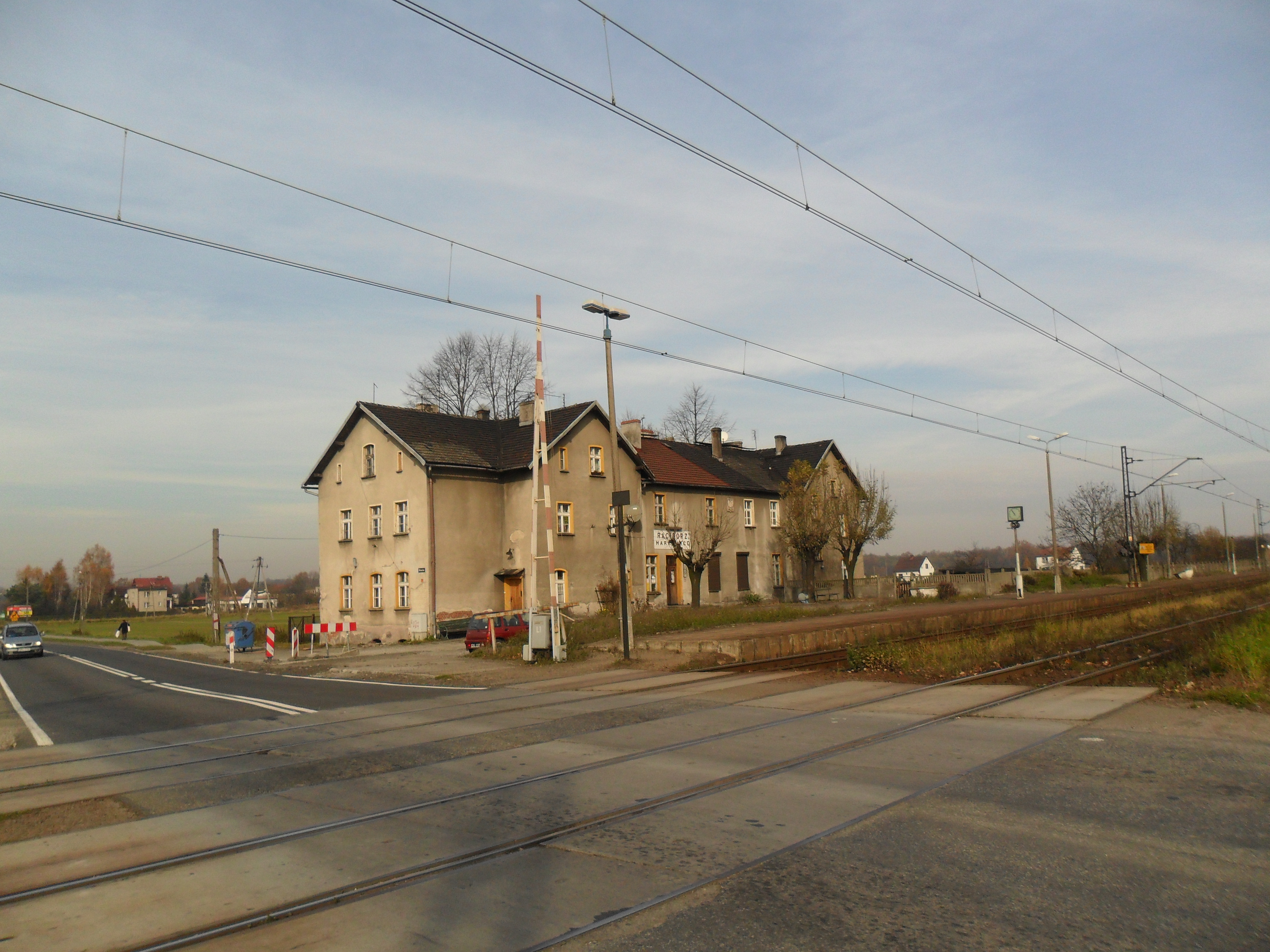 Stacja kolejowa Racibórz Markowice